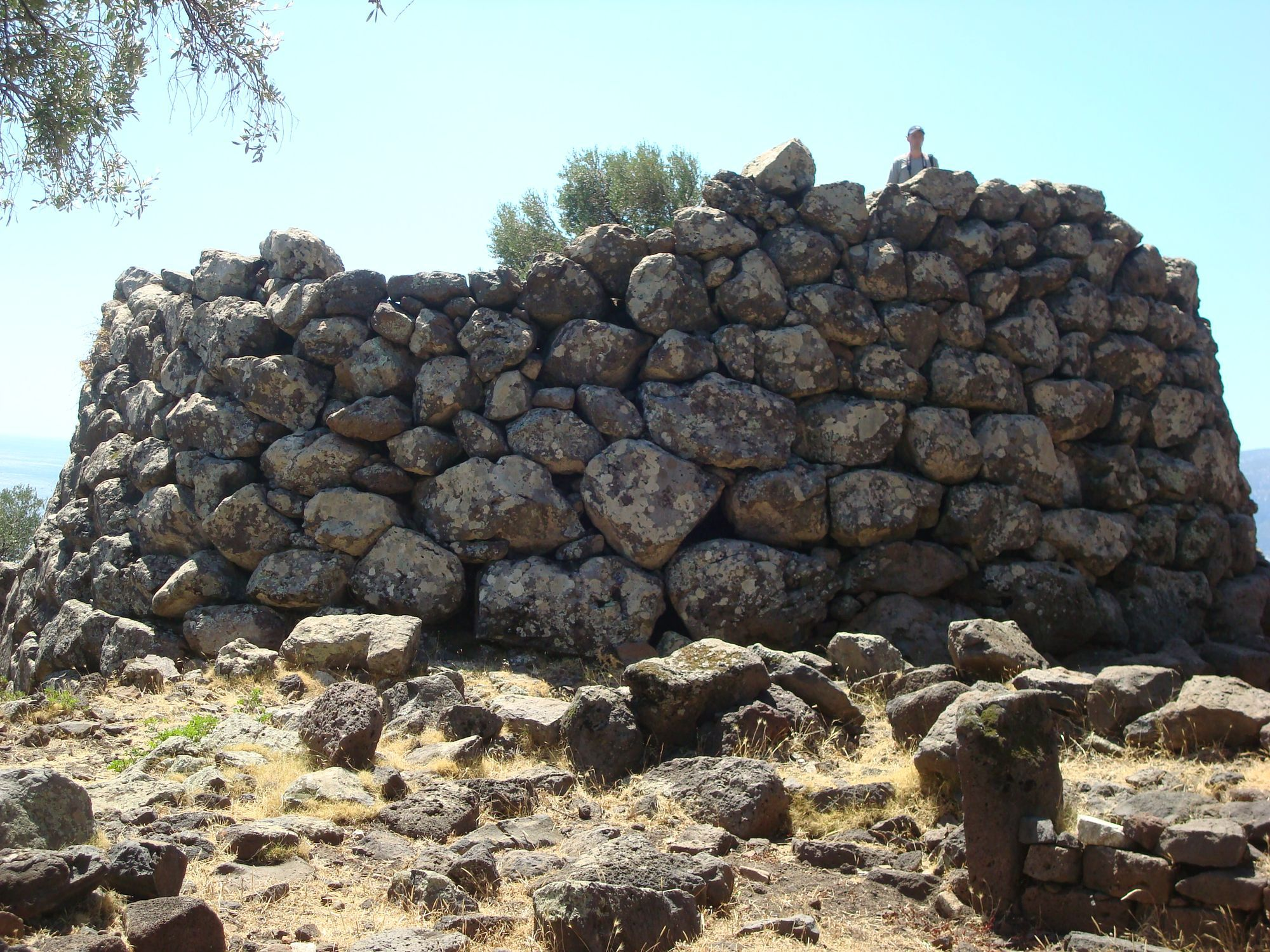 Nuraghe dell'omonimo sito archeologico, accessibile dalla strada per Cala Gonone (Dorgali).